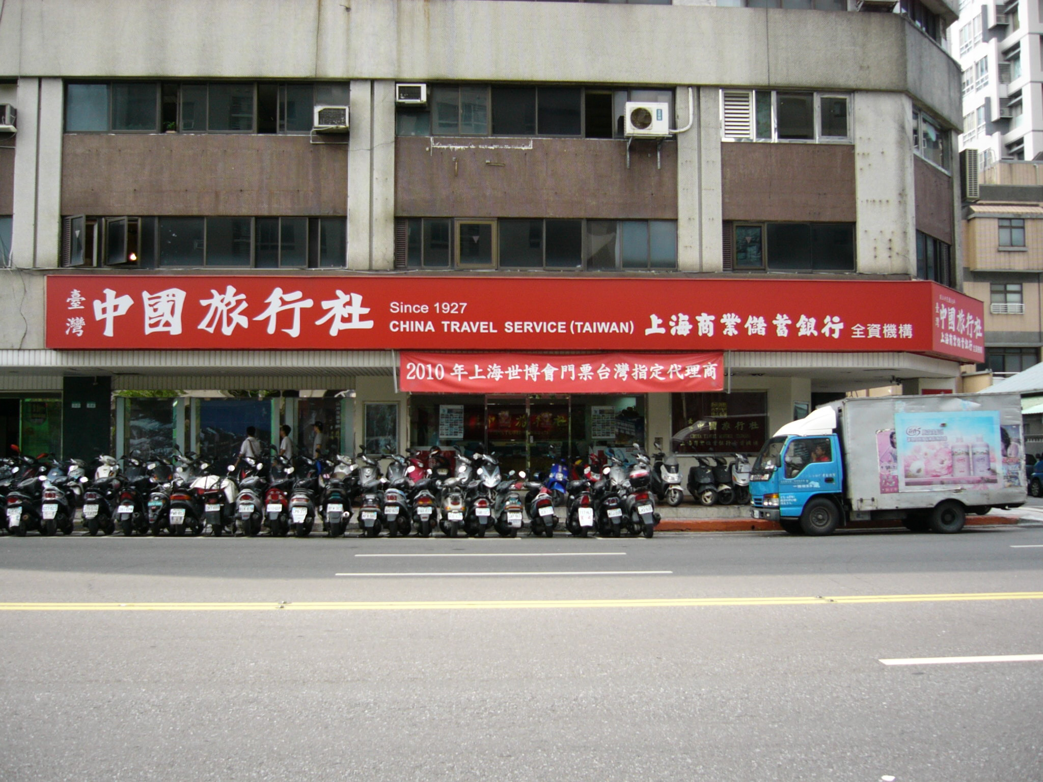 臺灣中國旅行社總部，地址：臺北市中山區林森北路54號1樓。